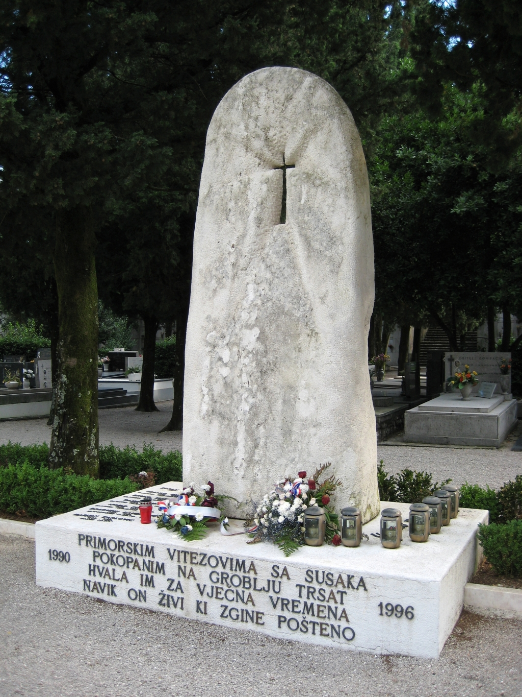 Spomenik primorskim vitezovima sa Sušaka, poginulima 1990-1996 na groblju Trsat